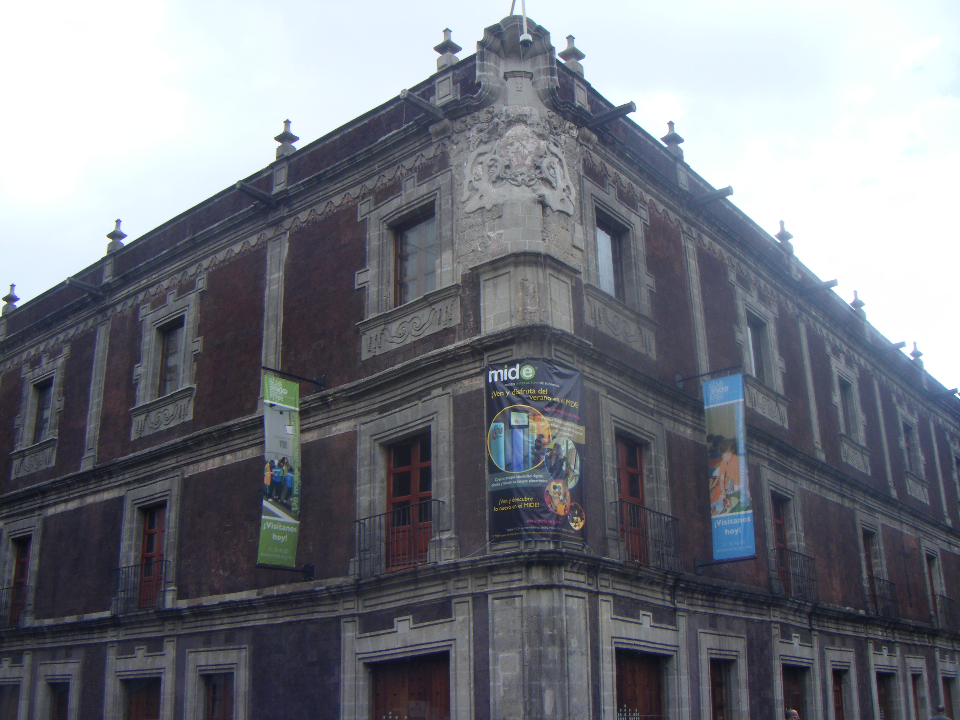 Museo Interactivo de Economía (MIDE), antiguo Hospital de Betlemitas. Ciudad de México.